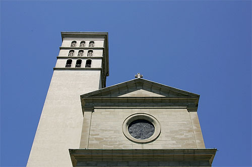 Lausanne: l'église catholique